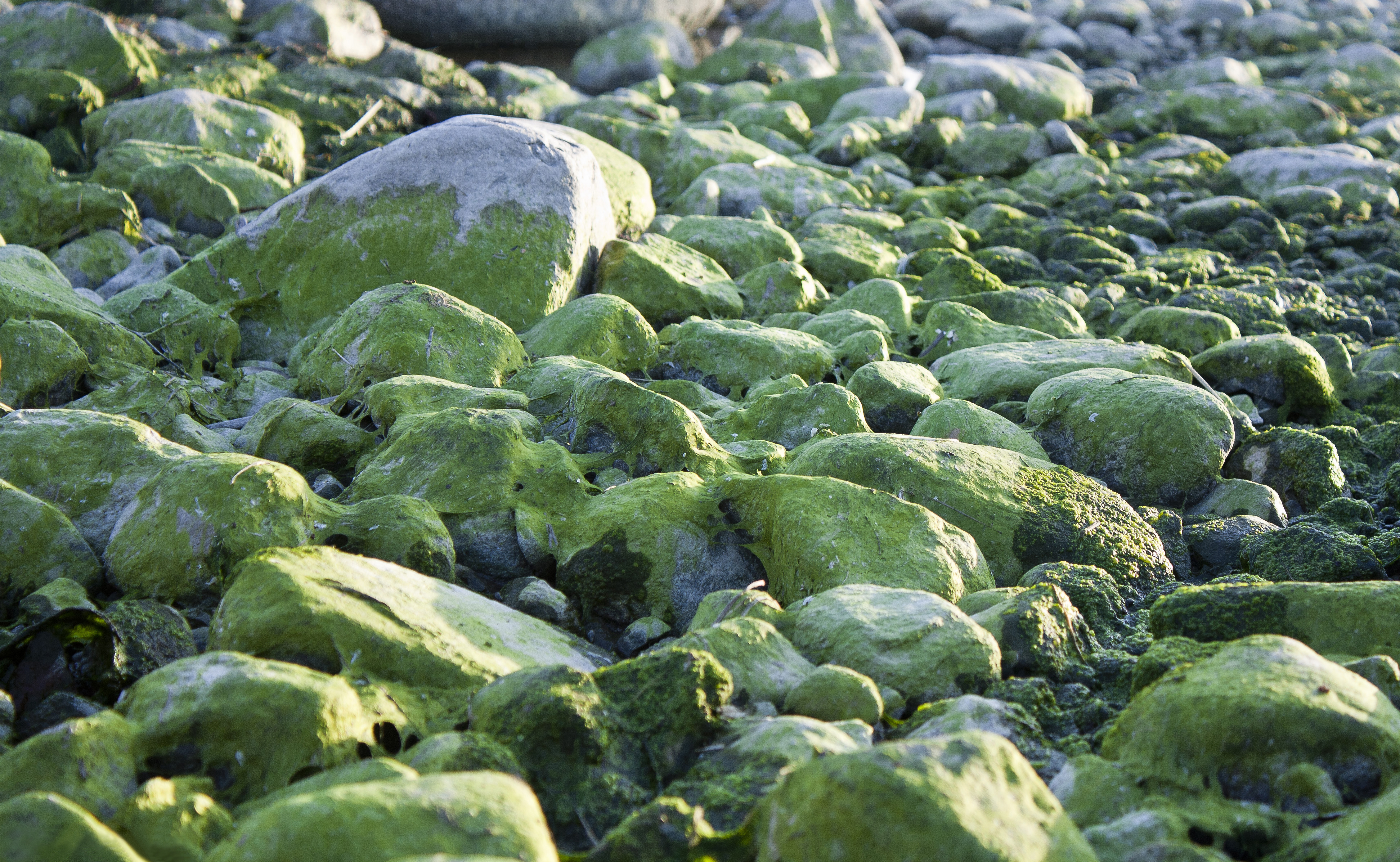 Põhja-Eesti rannakivid